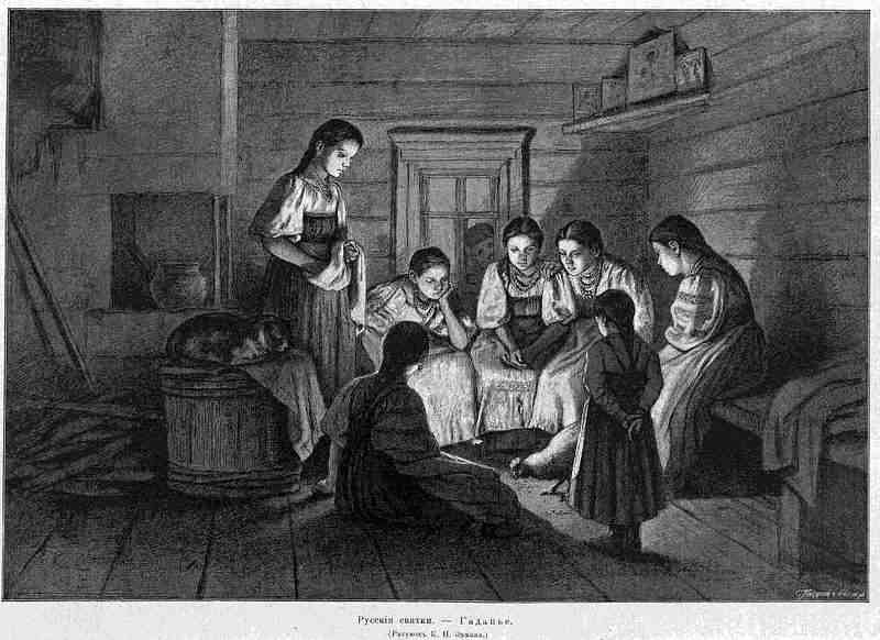 Русские святки. Гадание. "Всемирная иллюстрация", №52, 1885.